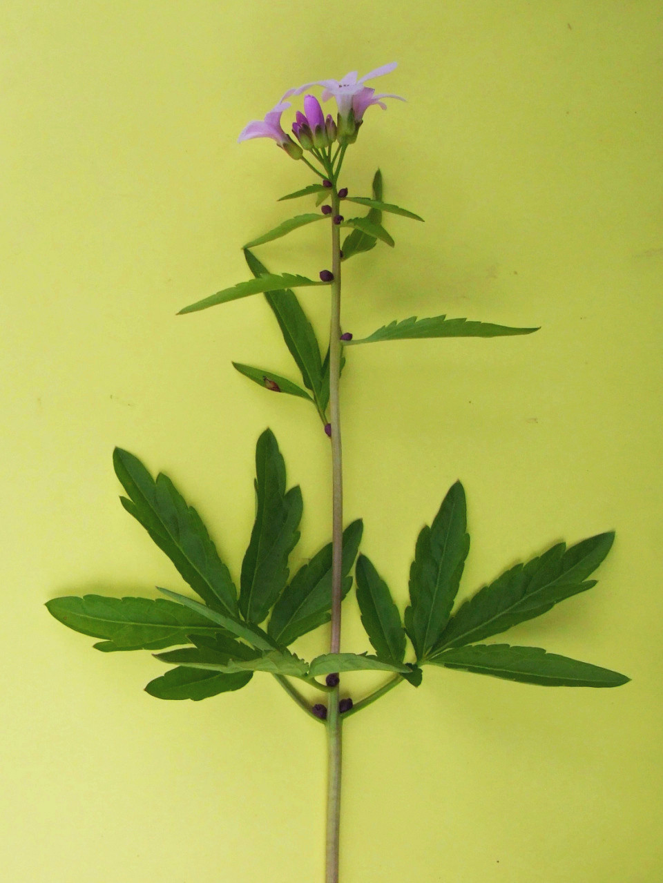 Dentaria bulbifera (habitat:Pieniny)